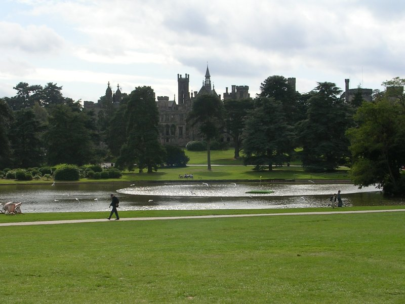 Le château du parc Alton Towers. Photo prise en septembre 2007 avec un Nikon coolpix 3200 et retouché sous Paint Shop Pro.